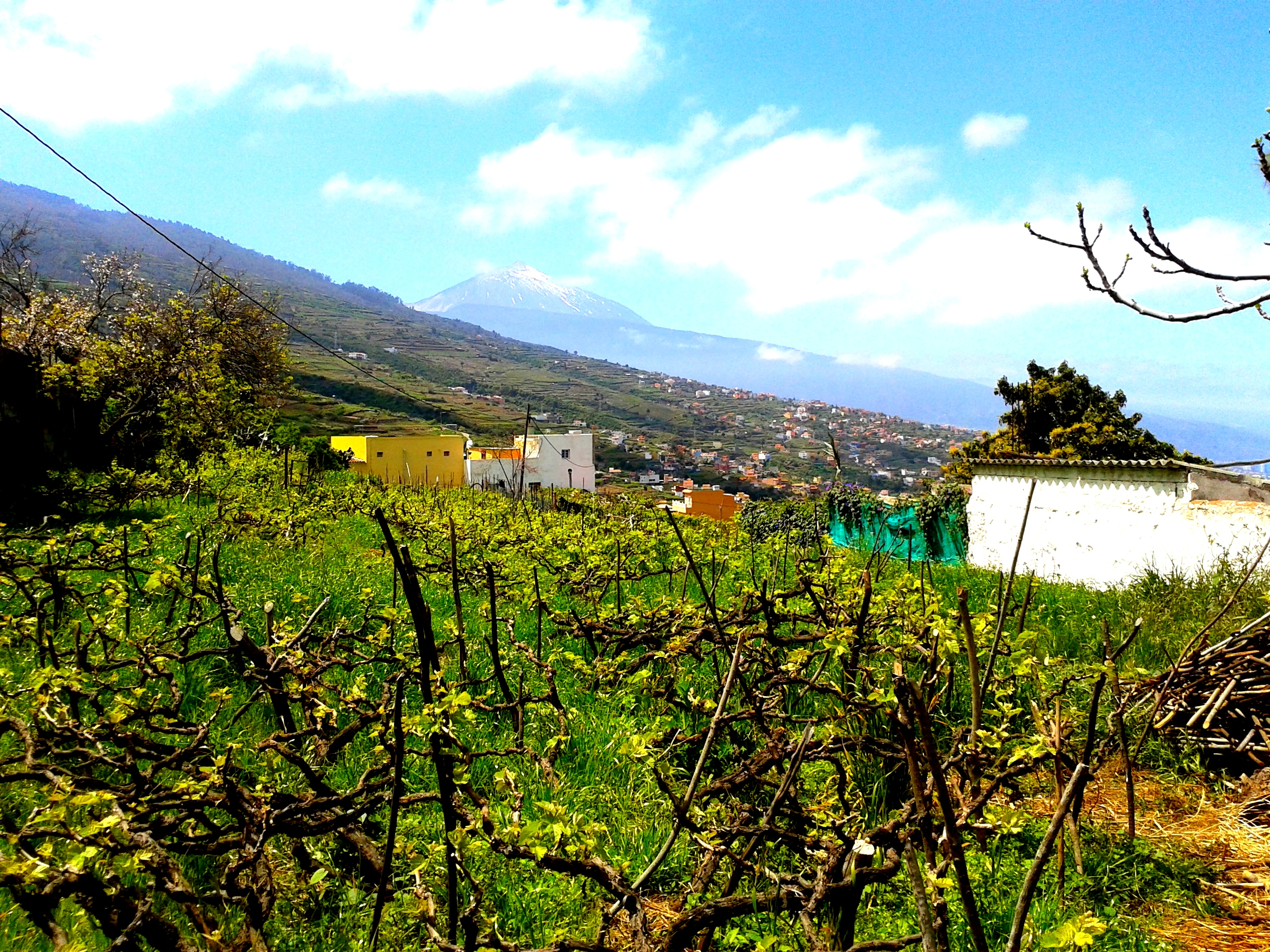 El Teide desde La Victoria de Acentejo